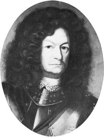 Raimondo Montecuccoli italian general